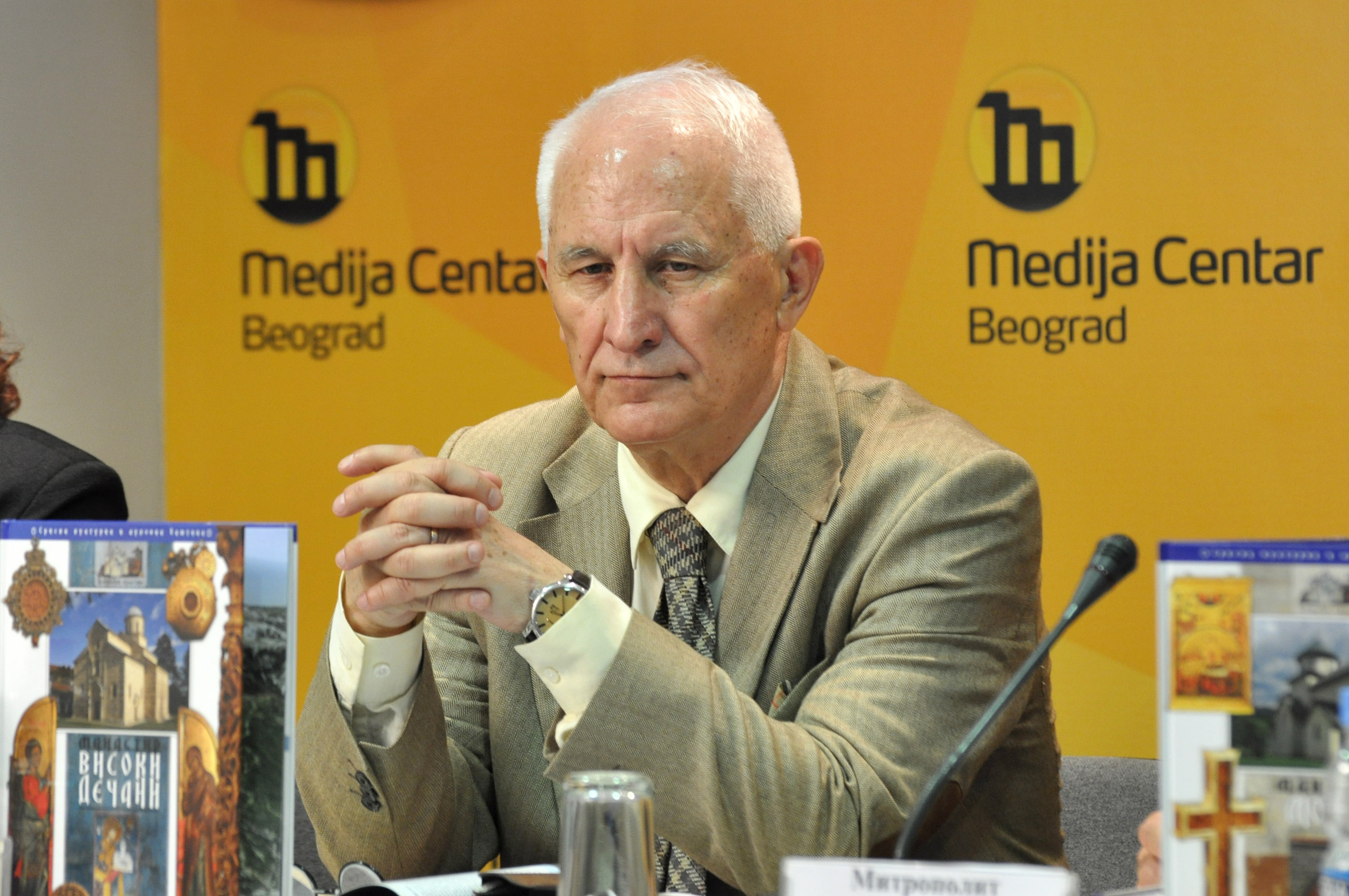 Matija Bećković 2011